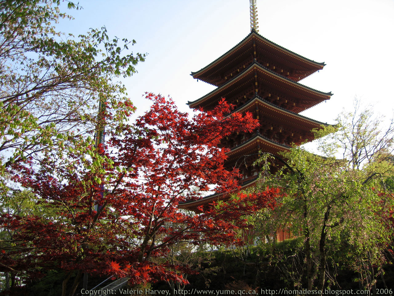 Auteure du fichier